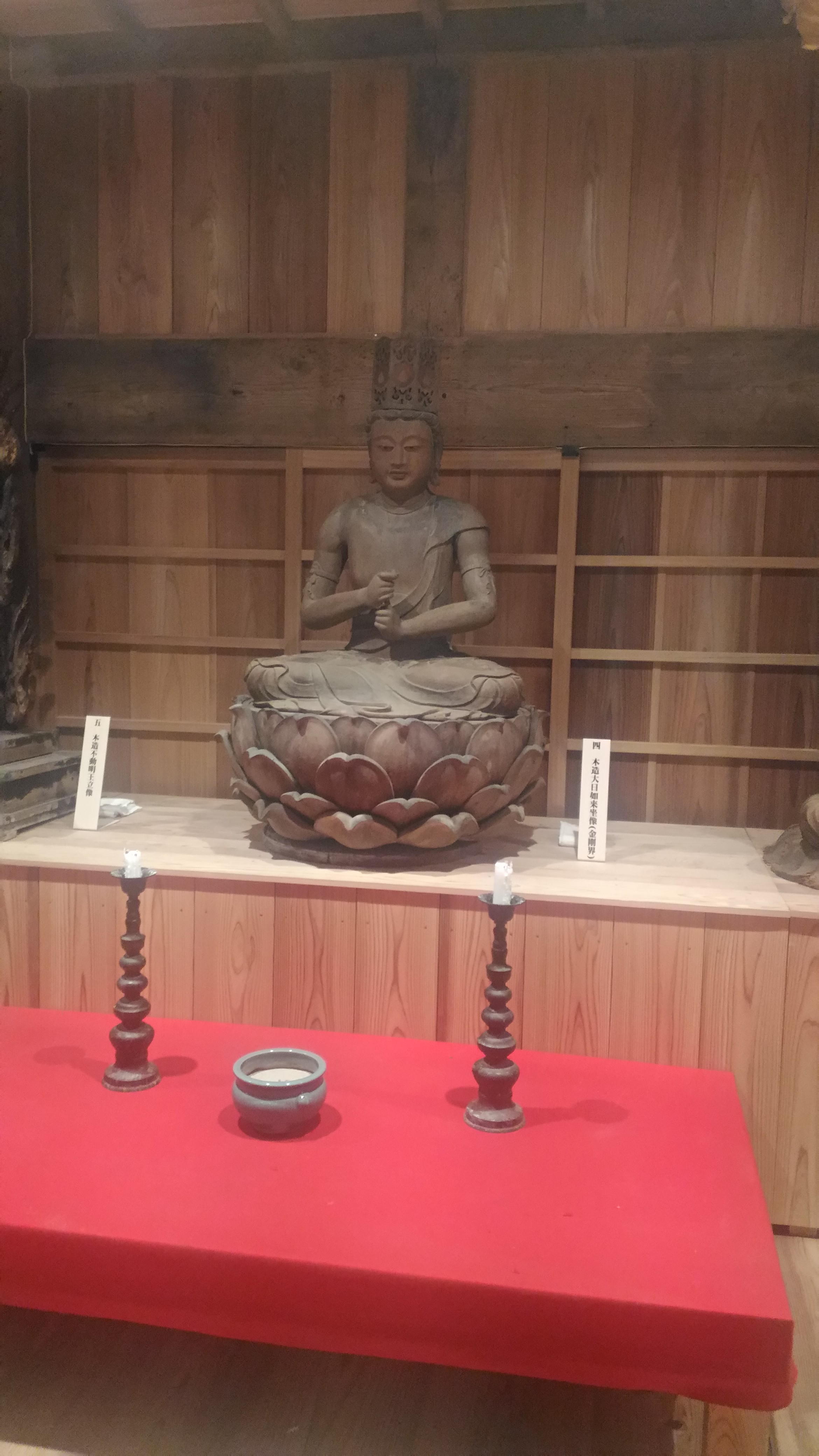 村山浅間神社 大日堂の大日如来